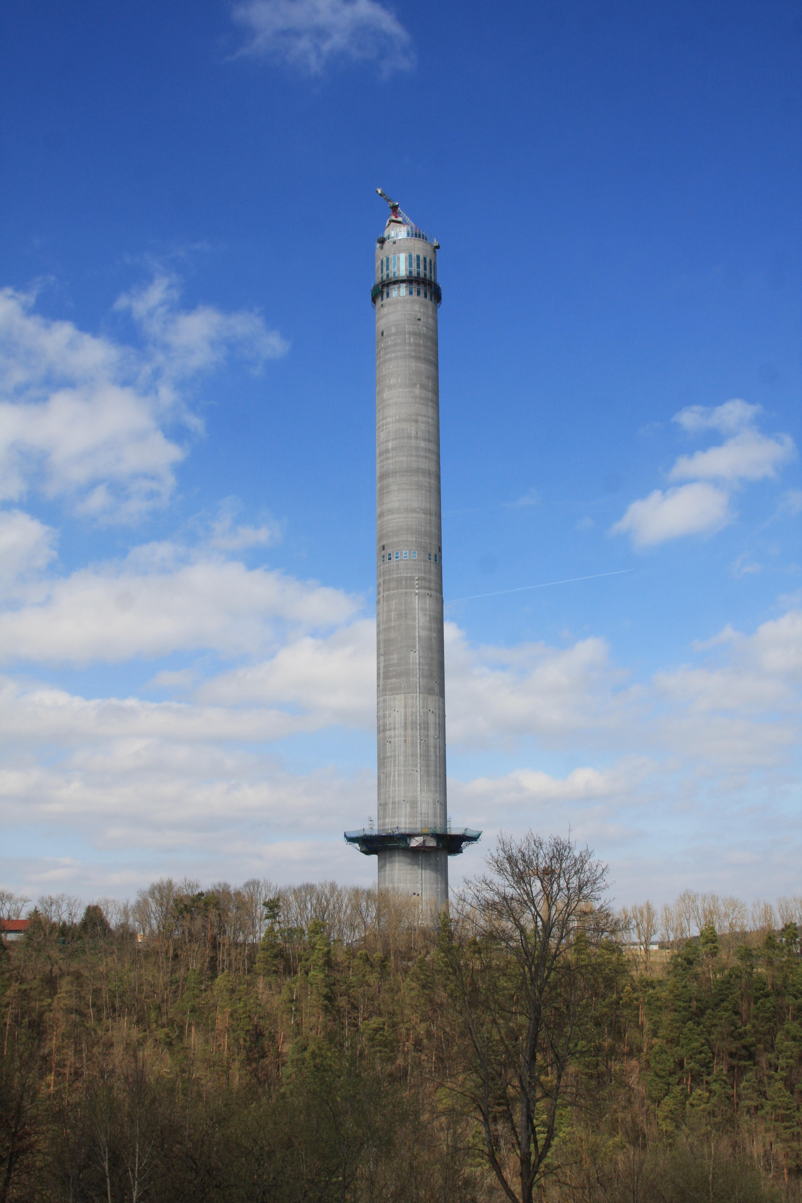 Der Aufzugstestturm in Rottweil